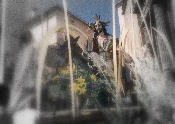 Cofradia de La Entrada de Jesús en Jerusalem (Andorra. Teruel)